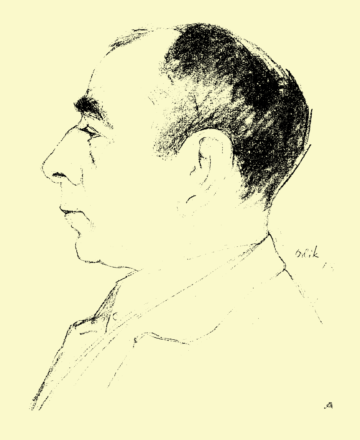 Emil Orlik: Porträt Moriz Heimann